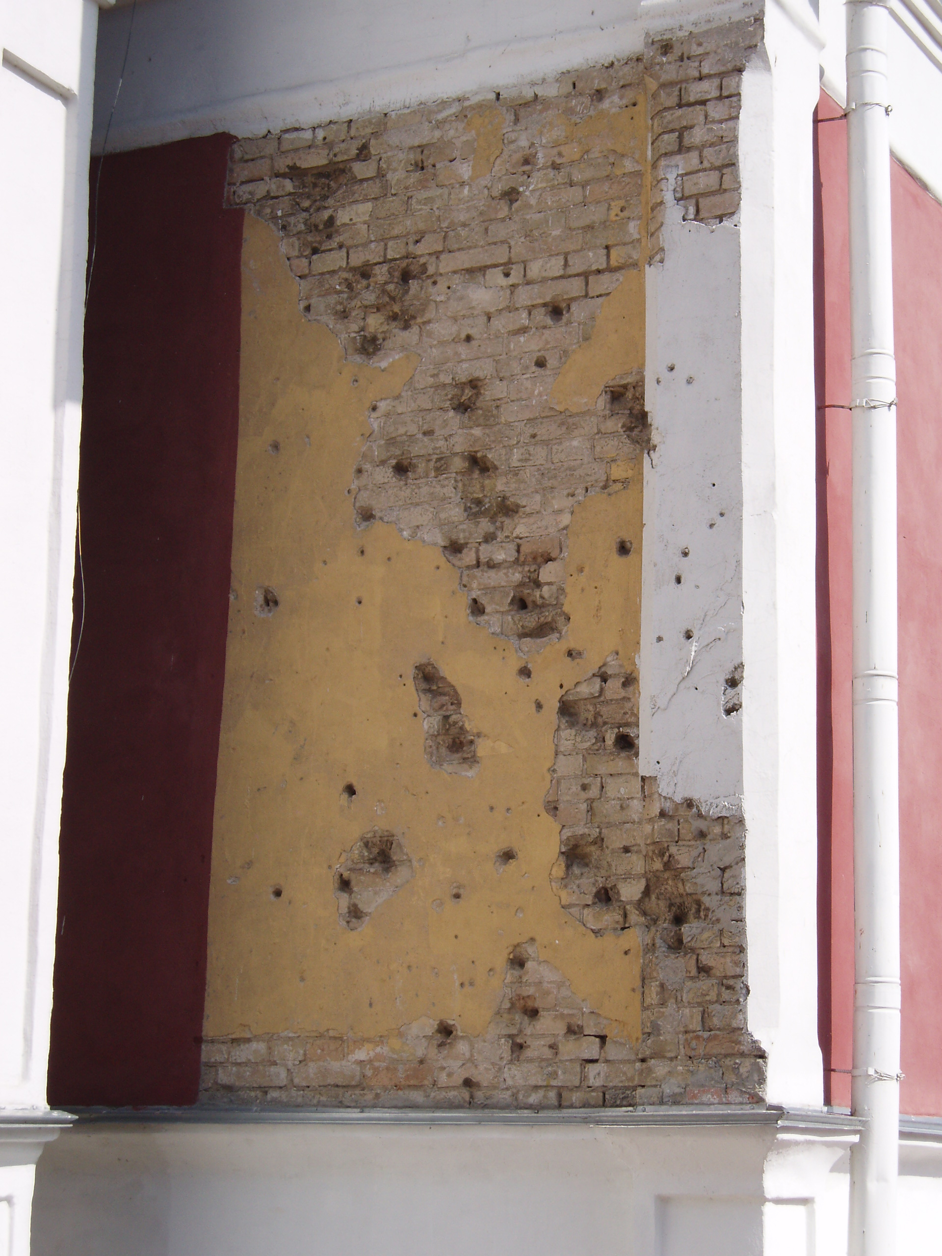 Церковь Бориса и Глеба в Вышгороде Киевской области. Следы разрушений в результате обстрела в ВОВ